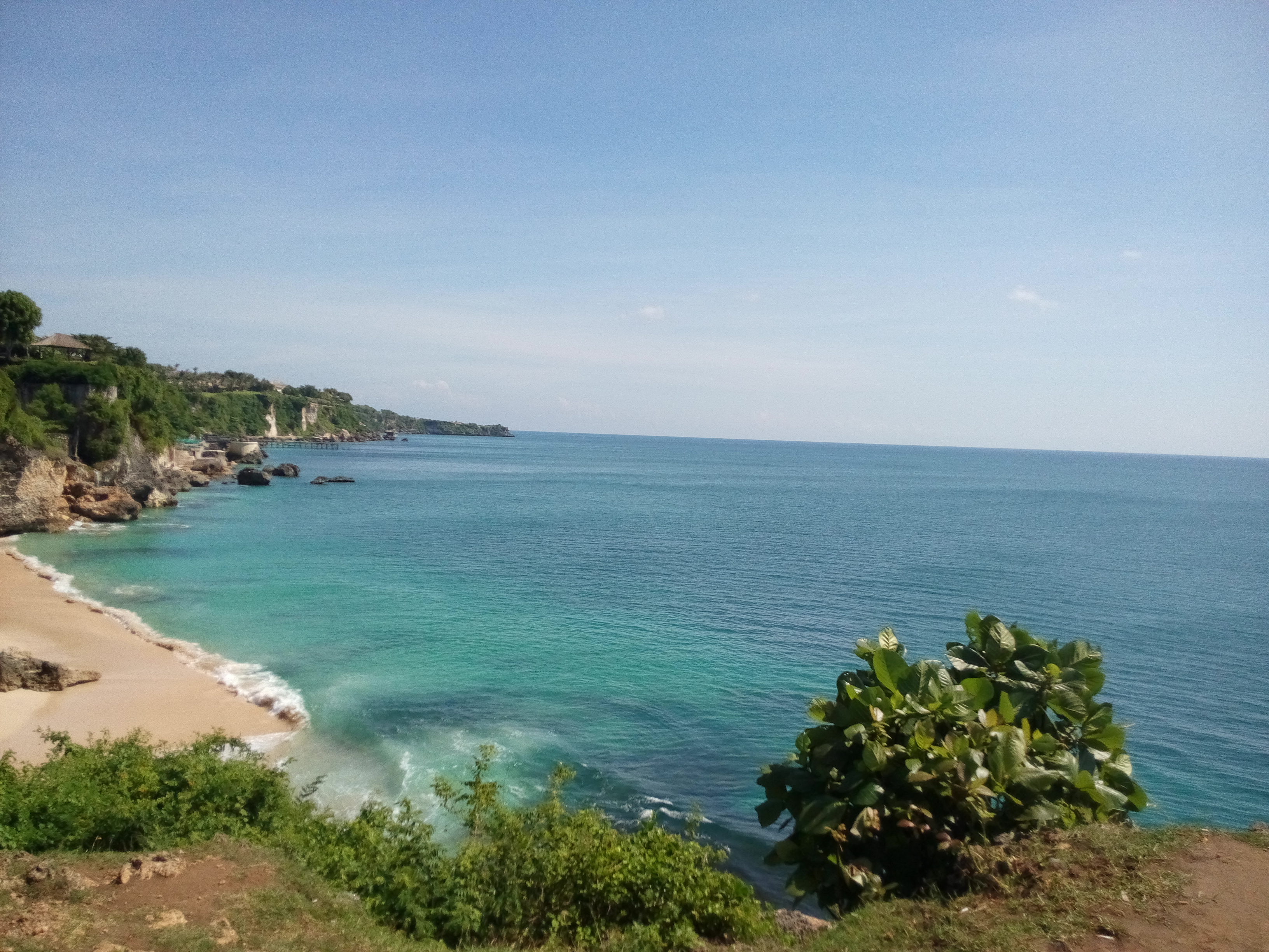 Sebuah pantai yang indah di Bali, yaitu Pantai Padang Padang. Dapat kita lihat suatu daratan yang asri melingkar dengan indahnya dan air laut yang jernih berwarna biru berkilauan. Salah satu pantai di Indonesia yang wajib dikunjungi.